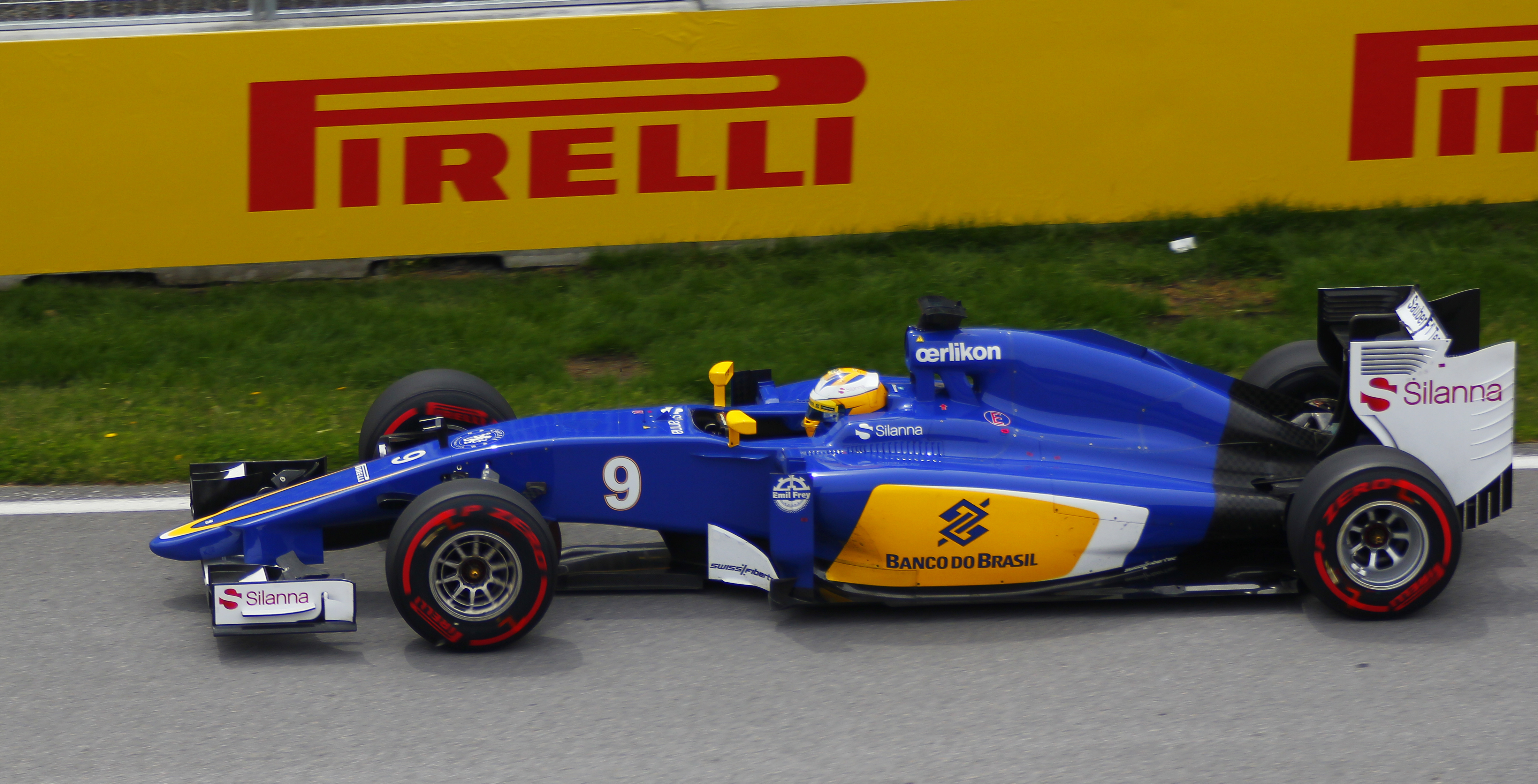 Marcus Ericsson - Sauber - Grand Prix du Canada - Circuit Gilles-Villeneuve - 7 juin 2015 (Photo Paul-Émile Poulin-Jacques)